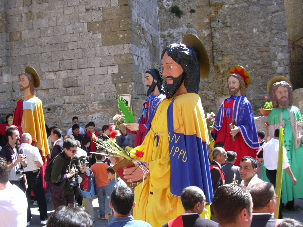 Aidone EN_Sicilia: Festa delle Palme coi i Santoni, rito davanti alla porta chiusa della chiesa di San Lorenzo